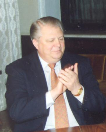 Vitali Georgyevich Smirnov, a Russian member of the International Olympic Committee.